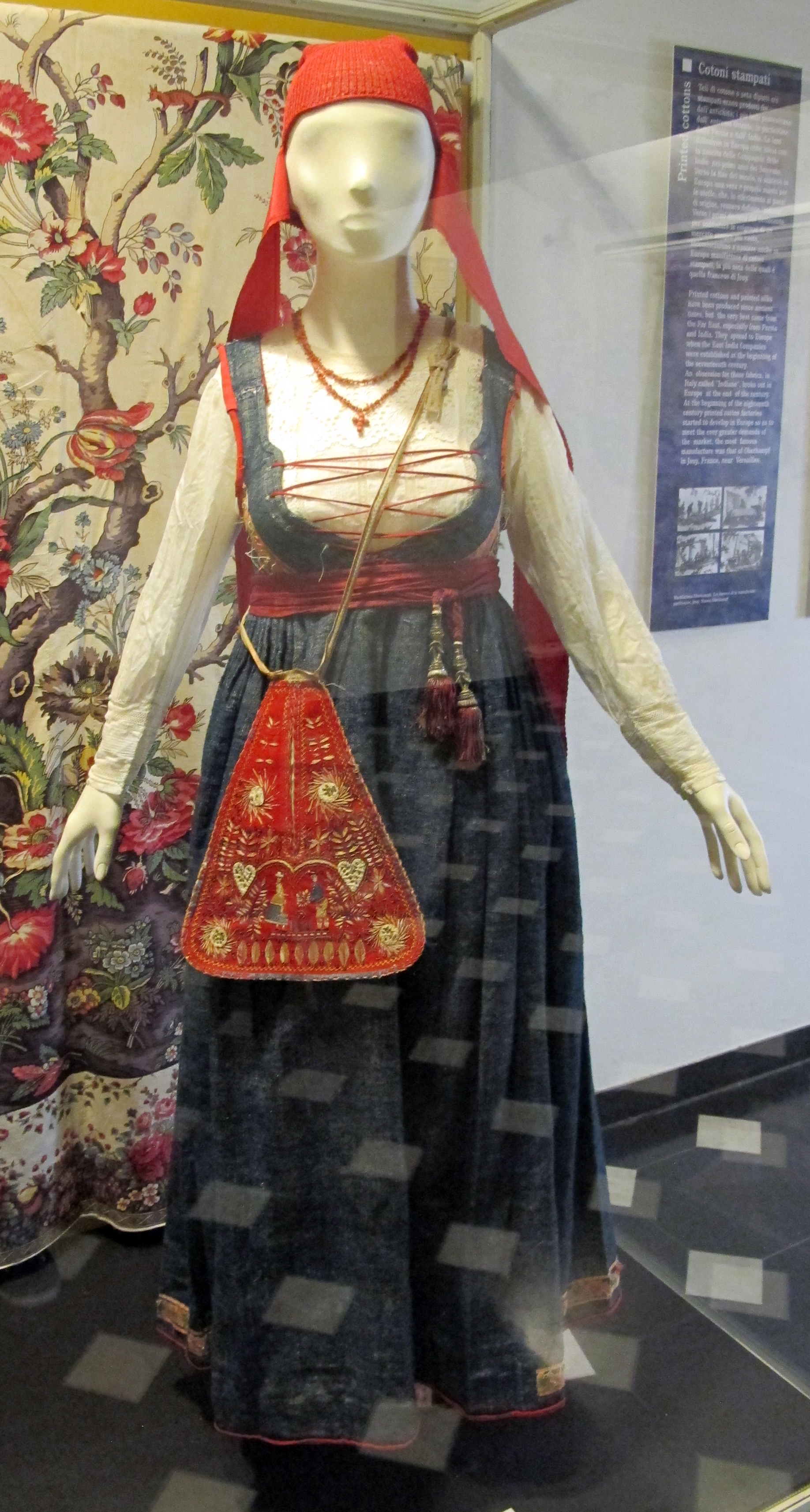 Palazzo Spinola in Pellicceria (Genova)